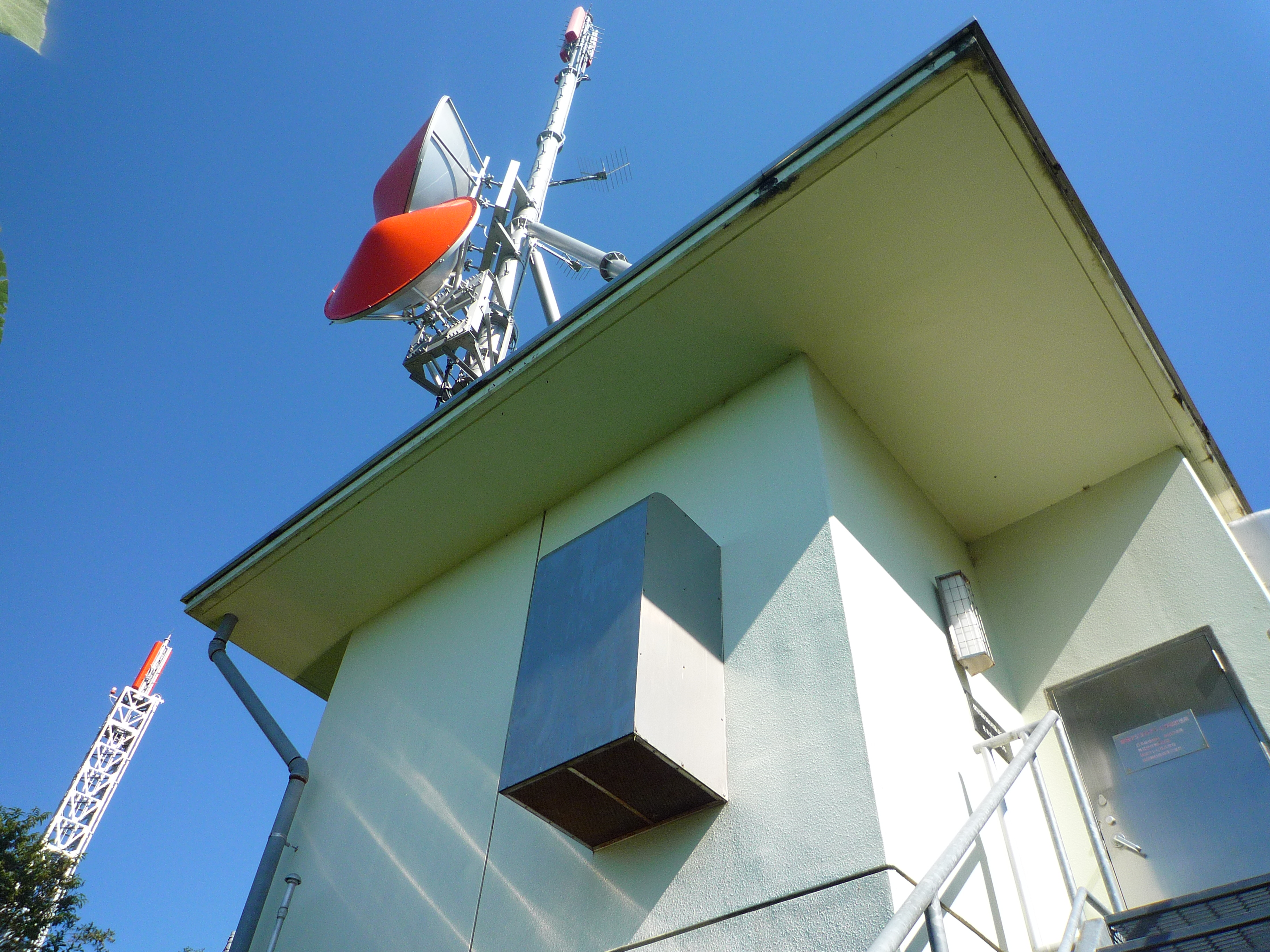 鷹巣デジタルテレビ中継放送所（旧秋田朝日放送アナログ中継局）2007年9月1日 開局 左下に見えるのは、かつての秋田テレビアナログ中継局